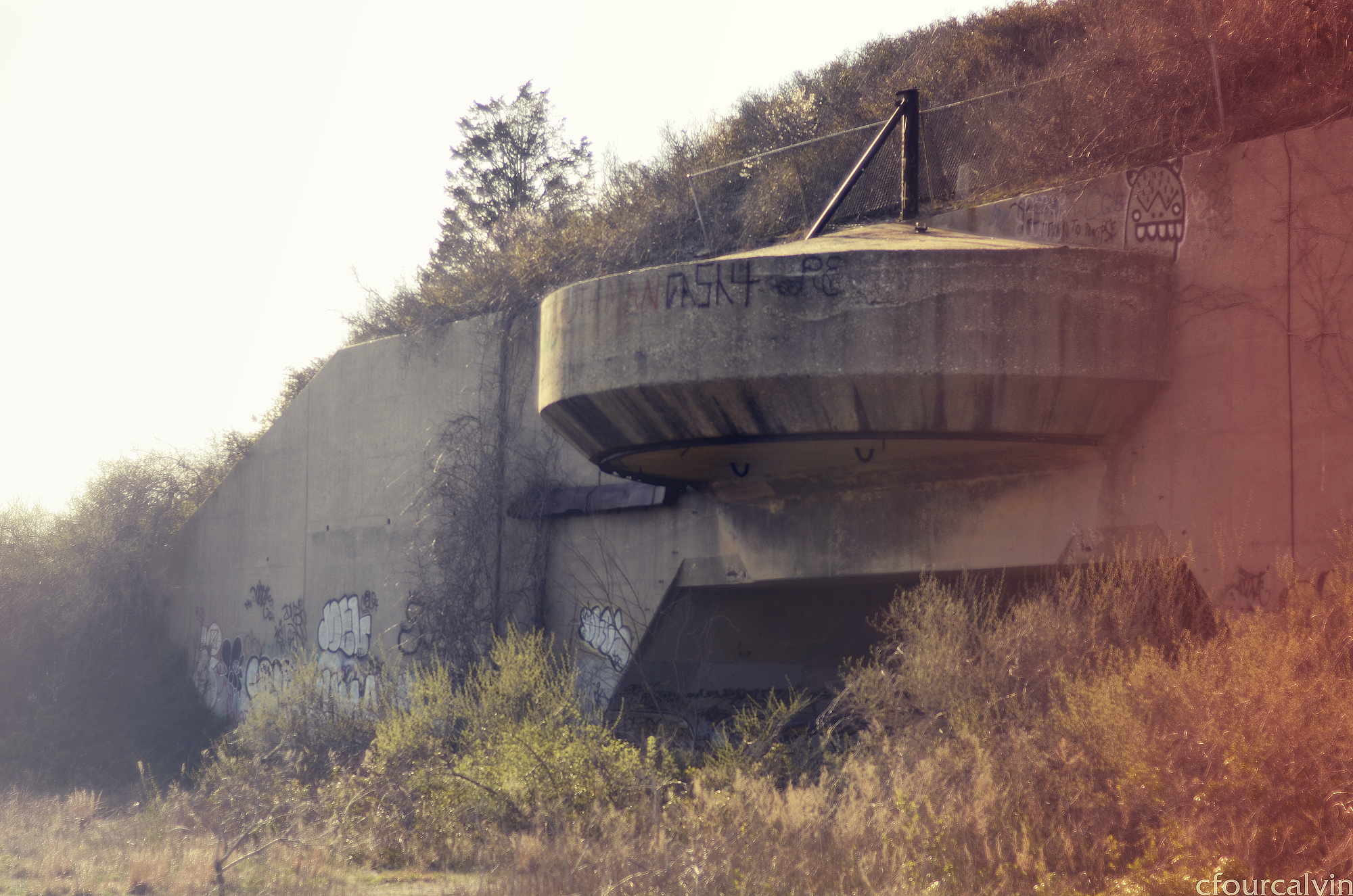 harris